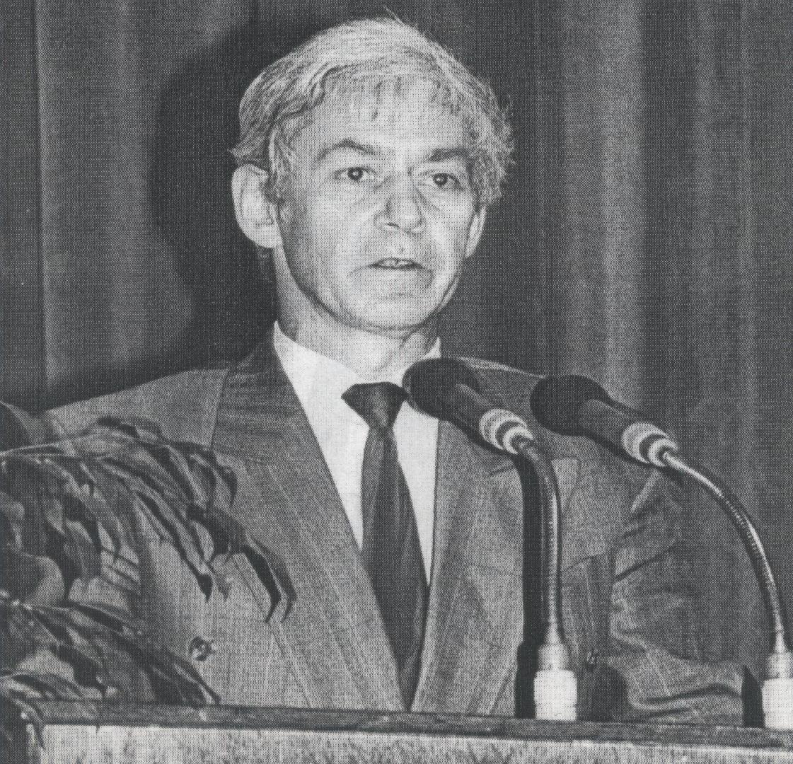 Gerd Wechsung als Prorektor bei einer Rede